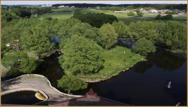 "Замок Радомысль". Вид на остров ландшафтного парка